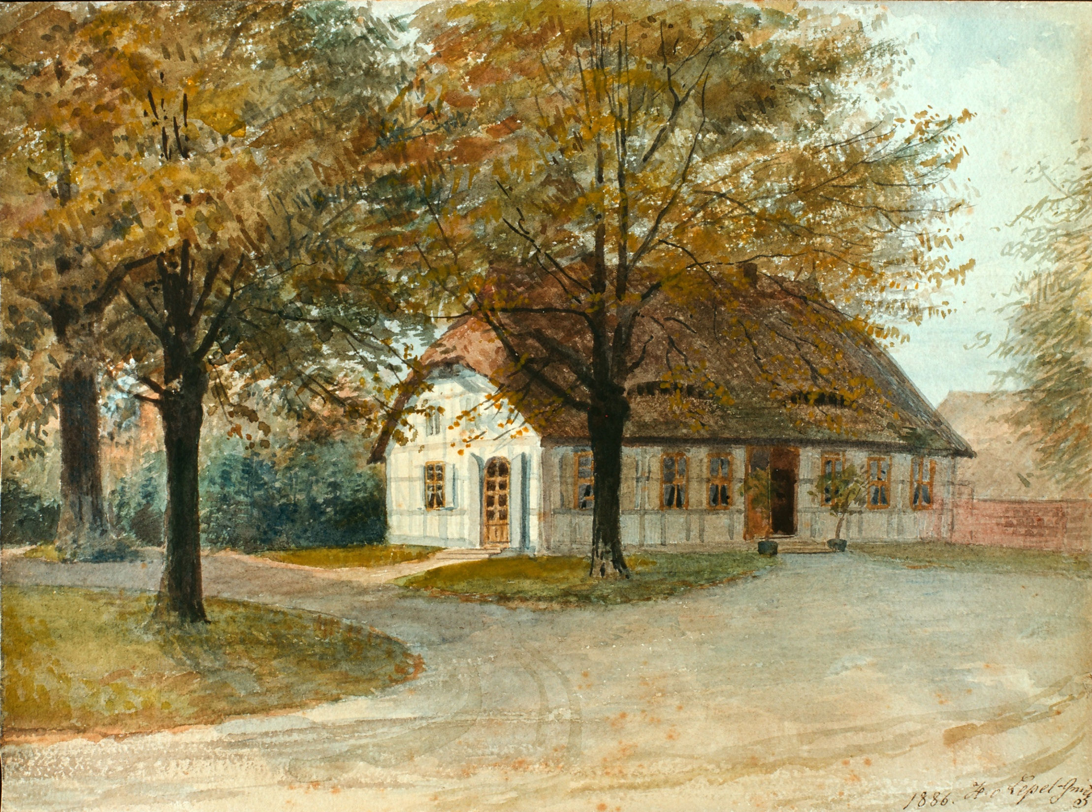 Gemälde Vorsteherhaus Neuendorf/Gnitz von 1886